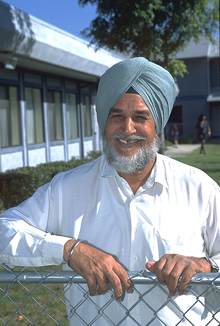 Dieses Bild wurde von en kopiert. Die dortige Beschreibung lautete: credit: US dept of Agriculture